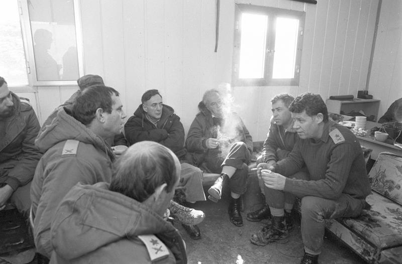 נוכחים: מפקד פיקוד צפון אלוף אורי אור (יושב מימין קרוב), שר הביטחון רב אלוף יצחק רבין(במרכז מימין), מתאם פעולות ישראל בלבנון אורי לוברני(במרכז משמאל), מפקד אוגדה 91 אילן בירן (יושב משמאל)